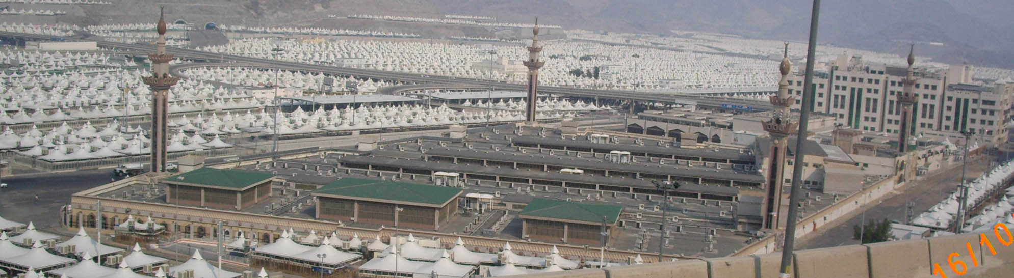 കൈഫ് മസ്ജിദ് മിന